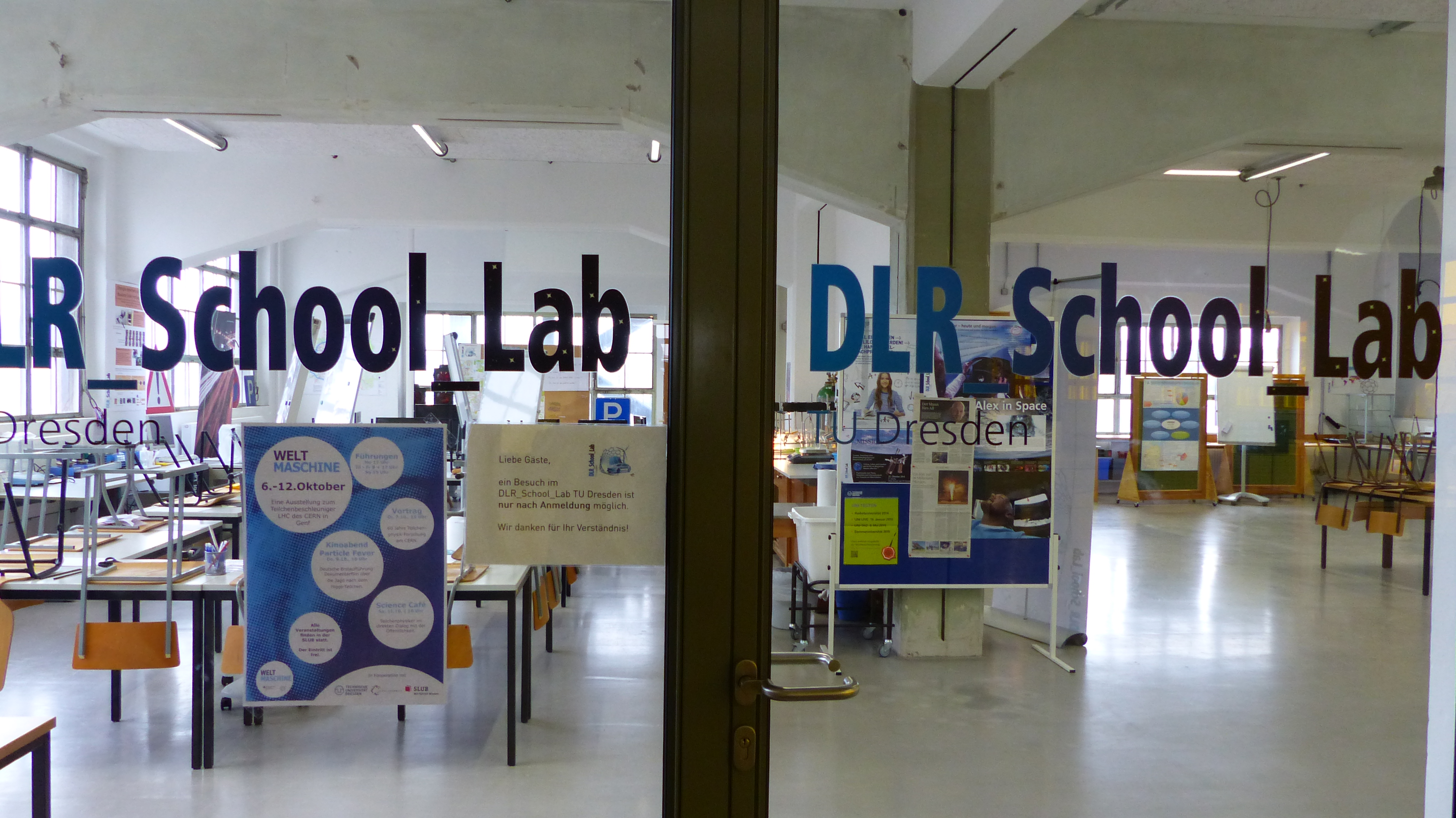 DLR School Lab Dresden, in den Technischen Sammlungen Dresden